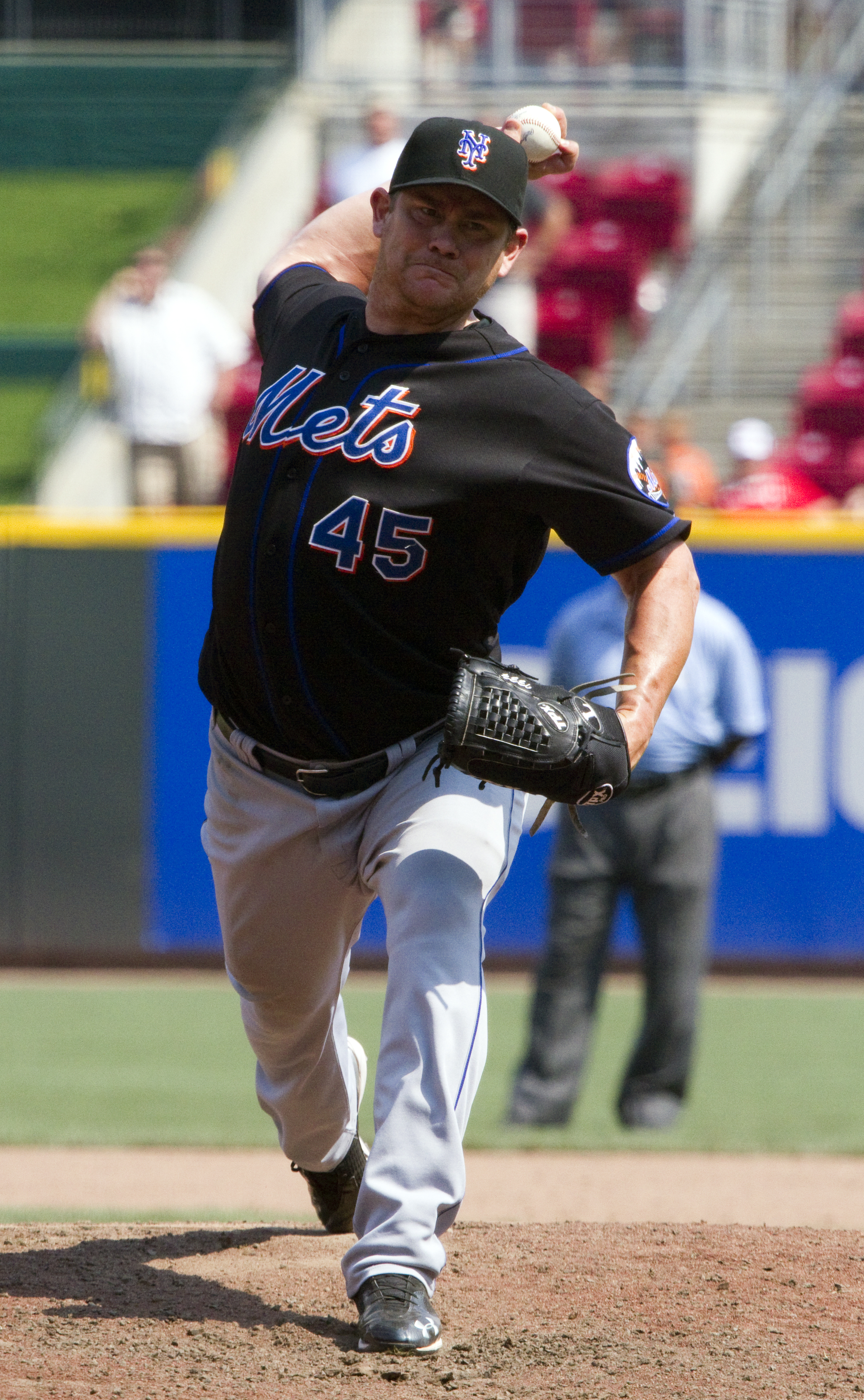 Jason Isringhausen